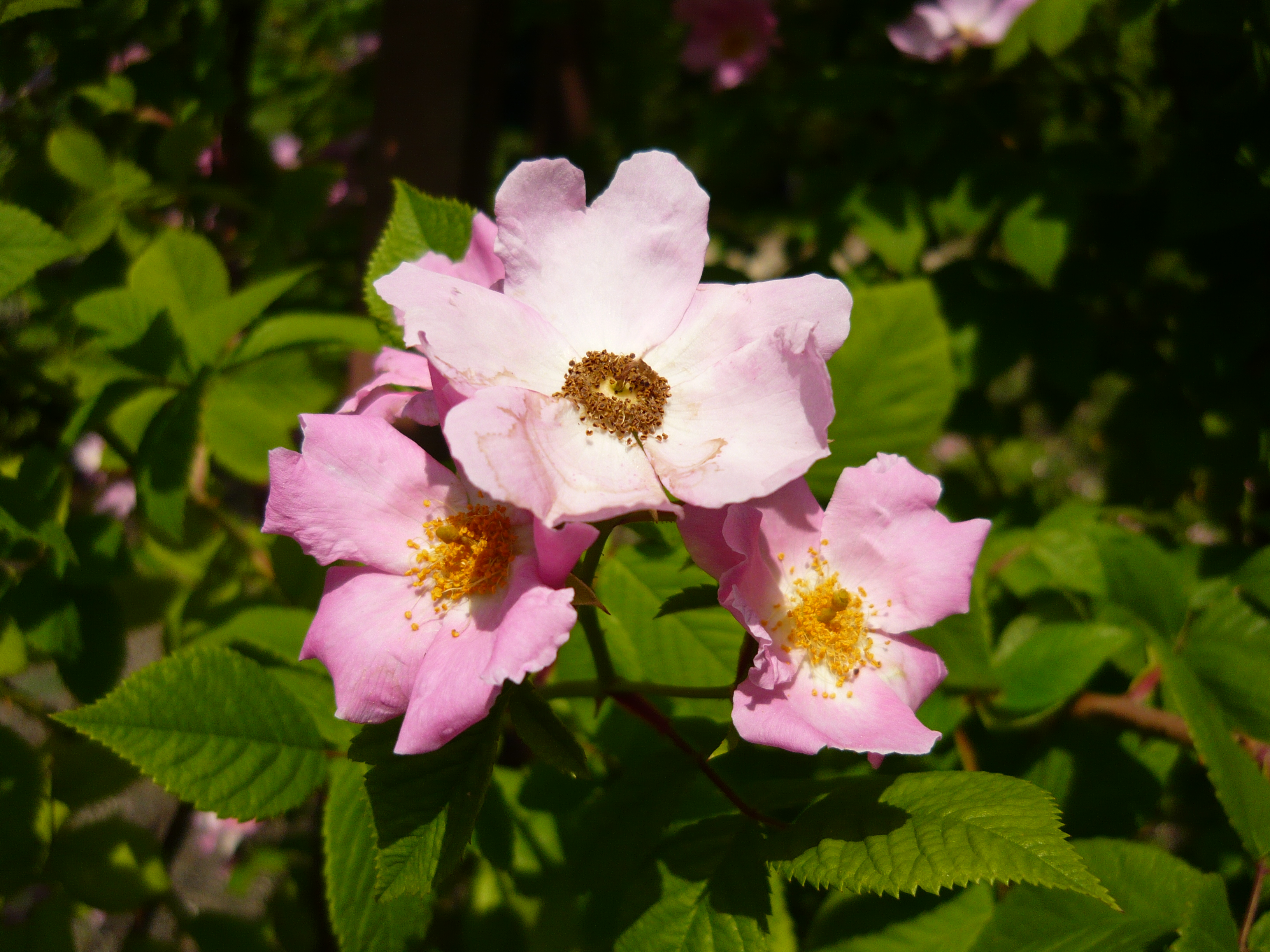 Rosa setigera. Real Jardín Botánico de Madrid.